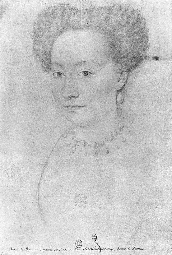 Portrait of Françoise de Montmorency-Fosseux, La Fosseuse, maîtresse de Henri IV